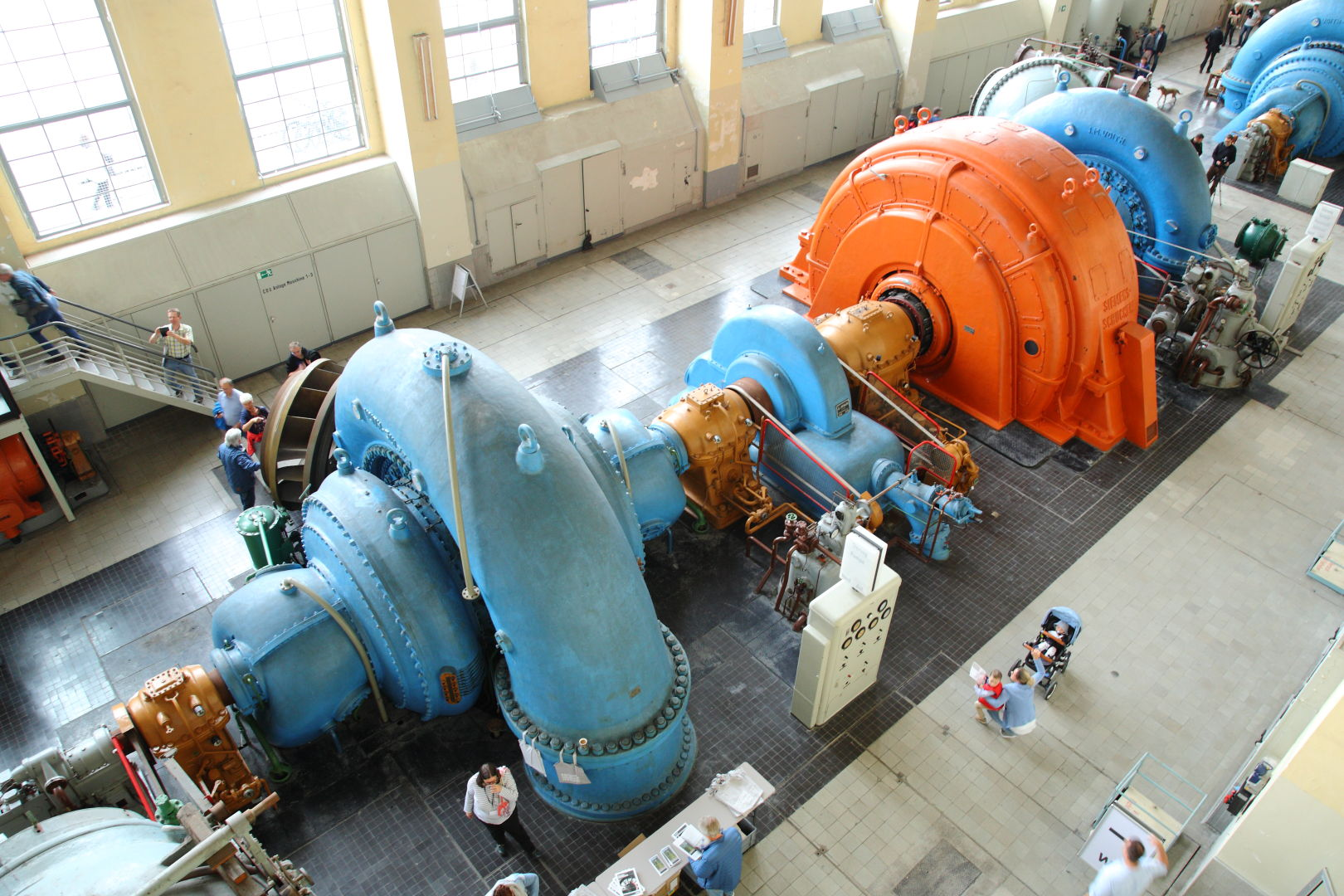 Einer der vier Maschinensätze des alten Koepchenwerkes